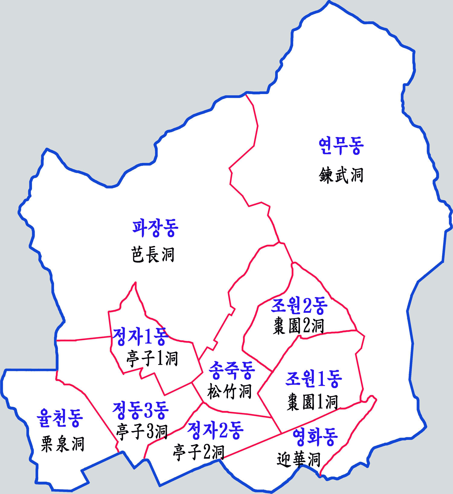 수원시 장안구 행정구역도